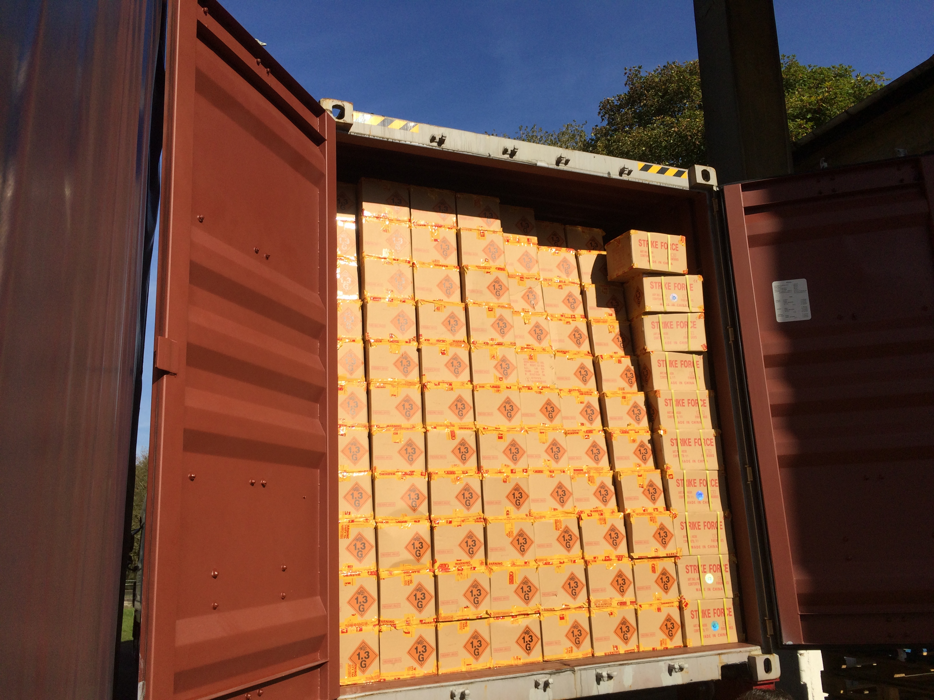 輸送途中での急ブレーキ等の衝撃で前のめりに荷崩れを起こした、輸入花火を詰めた荷物。この様な小サイズの箱を大量に積んでいる場合は、右端の最上段のような落下寸前の荷物がドアを開けた際に、崩れ落ちて受傷事故の原因となる。この様な事故を防ぐ為には、出荷元で間口全体に使い捨ての網を掛けたり、簡易な木枠で防御壁を作る一手間で防げる。